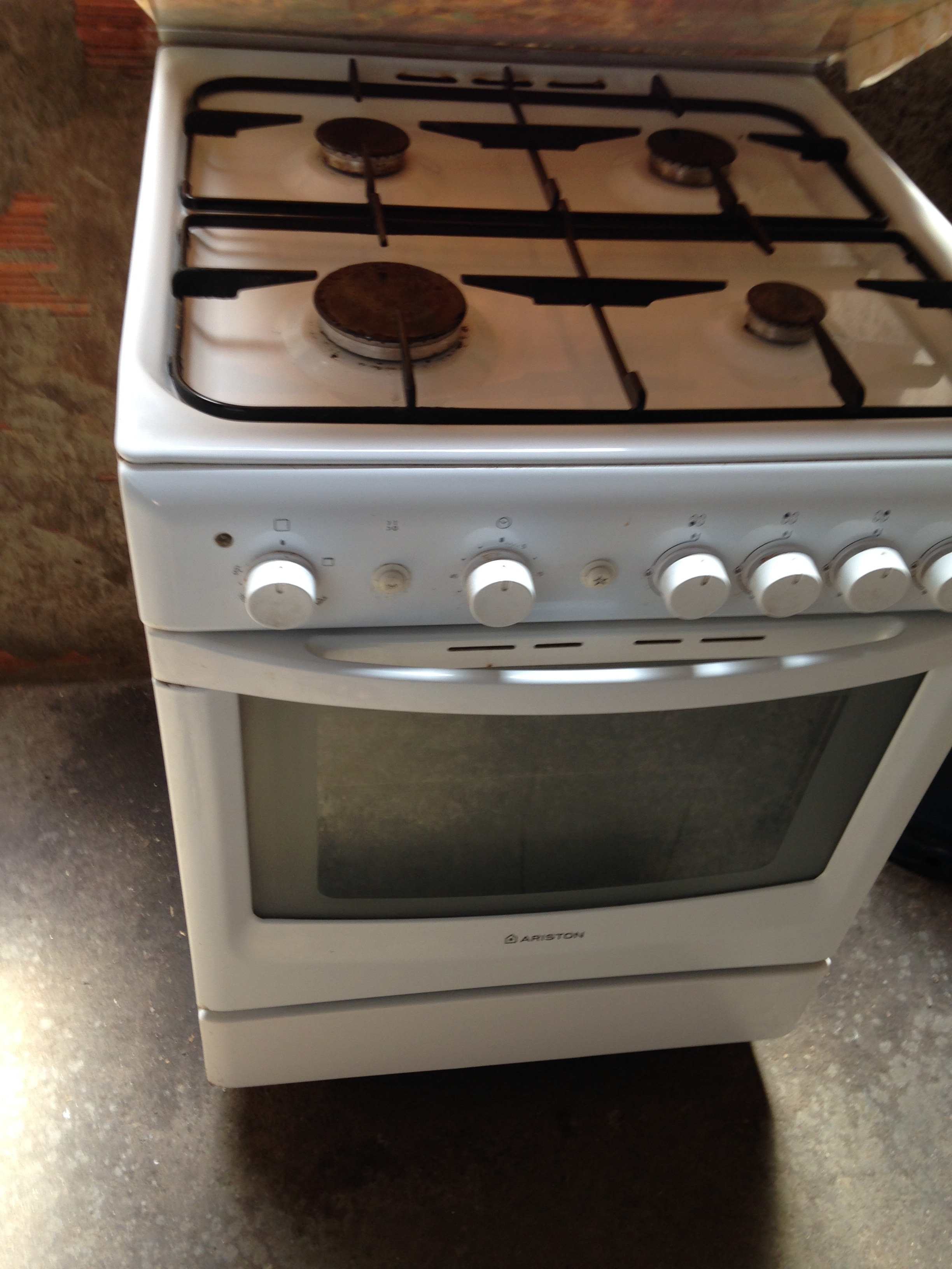 Cucina dotata di timer cottura, quattro fornelli e forno a gas